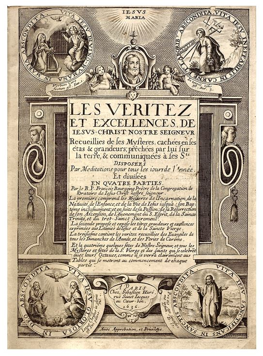 Page de titre des Véritez et excellences de Jésus-Christ notre Seigneur... de François Bourgoing (Paris : 1636).